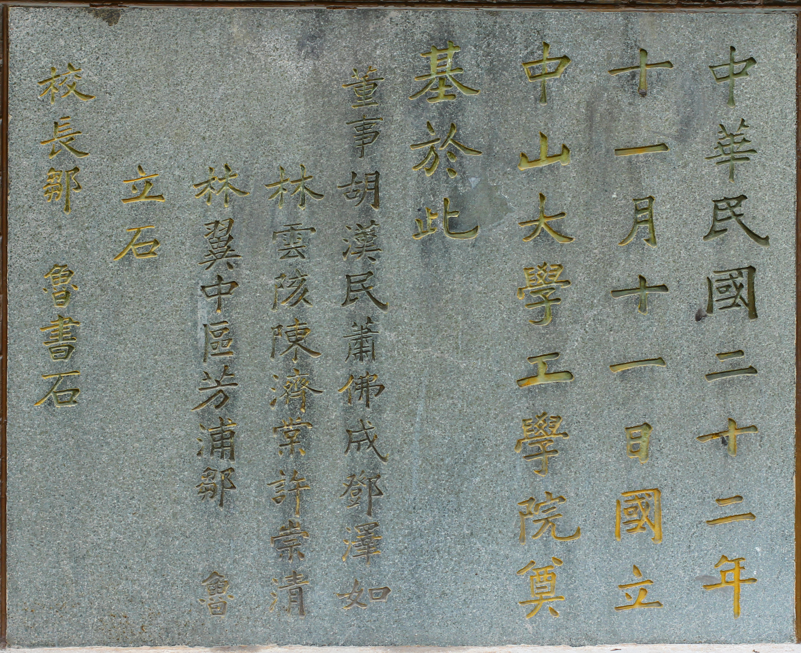 中華民國二十二年十一月十一日國立中山大學工學院奠基於此。 董事胡漢民蕭佛成鄧澤如 林雲陔陳濟棠許崇清 林翼中區芳浦鄒魯 立石 校長鄒魯書石 校董名單在文化大革命期間曾被人用水泥塗抹，現已被鏟除，但依然可見破壞痕跡。